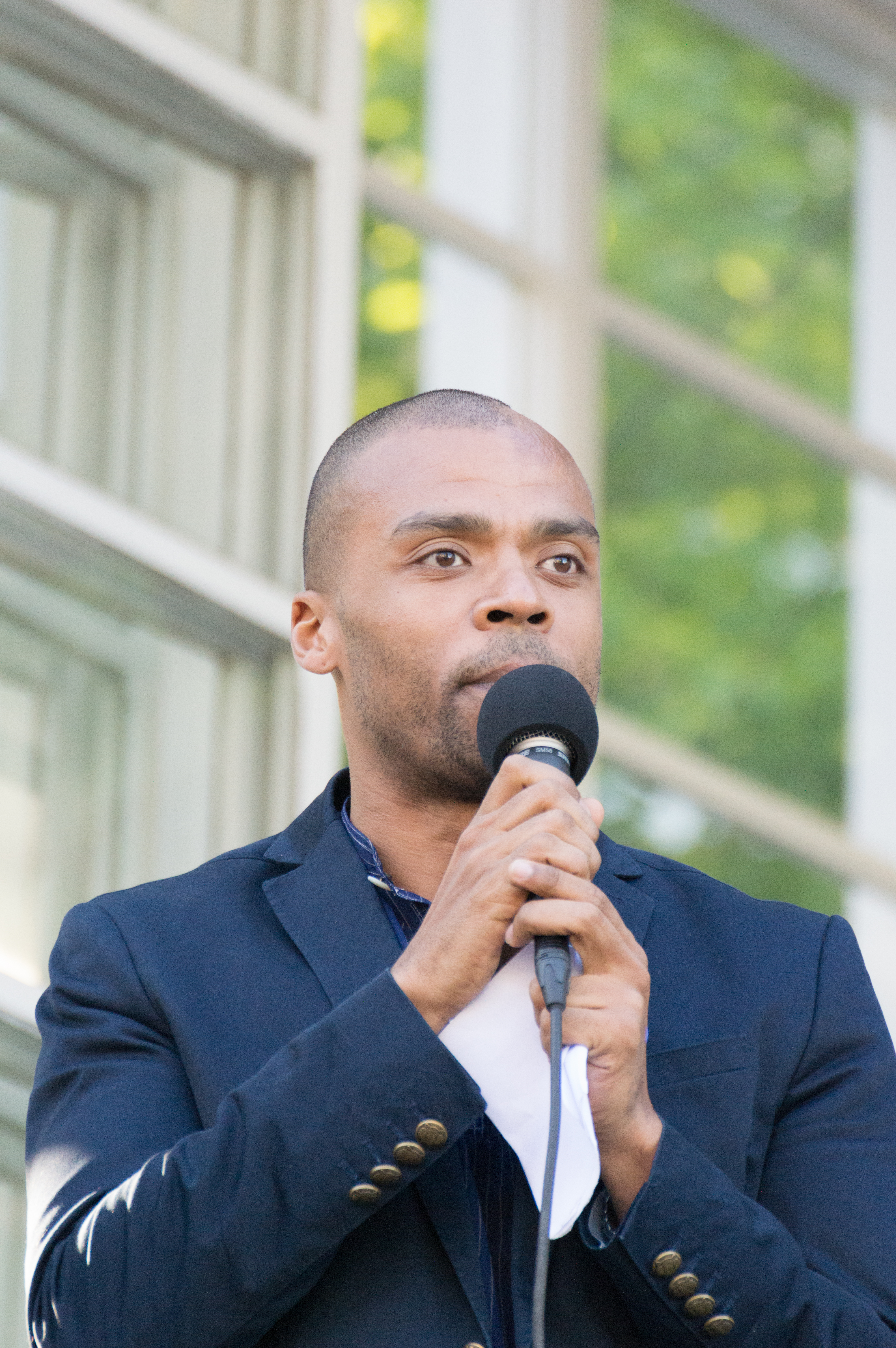 Jani Toivola suomalainen juontaja